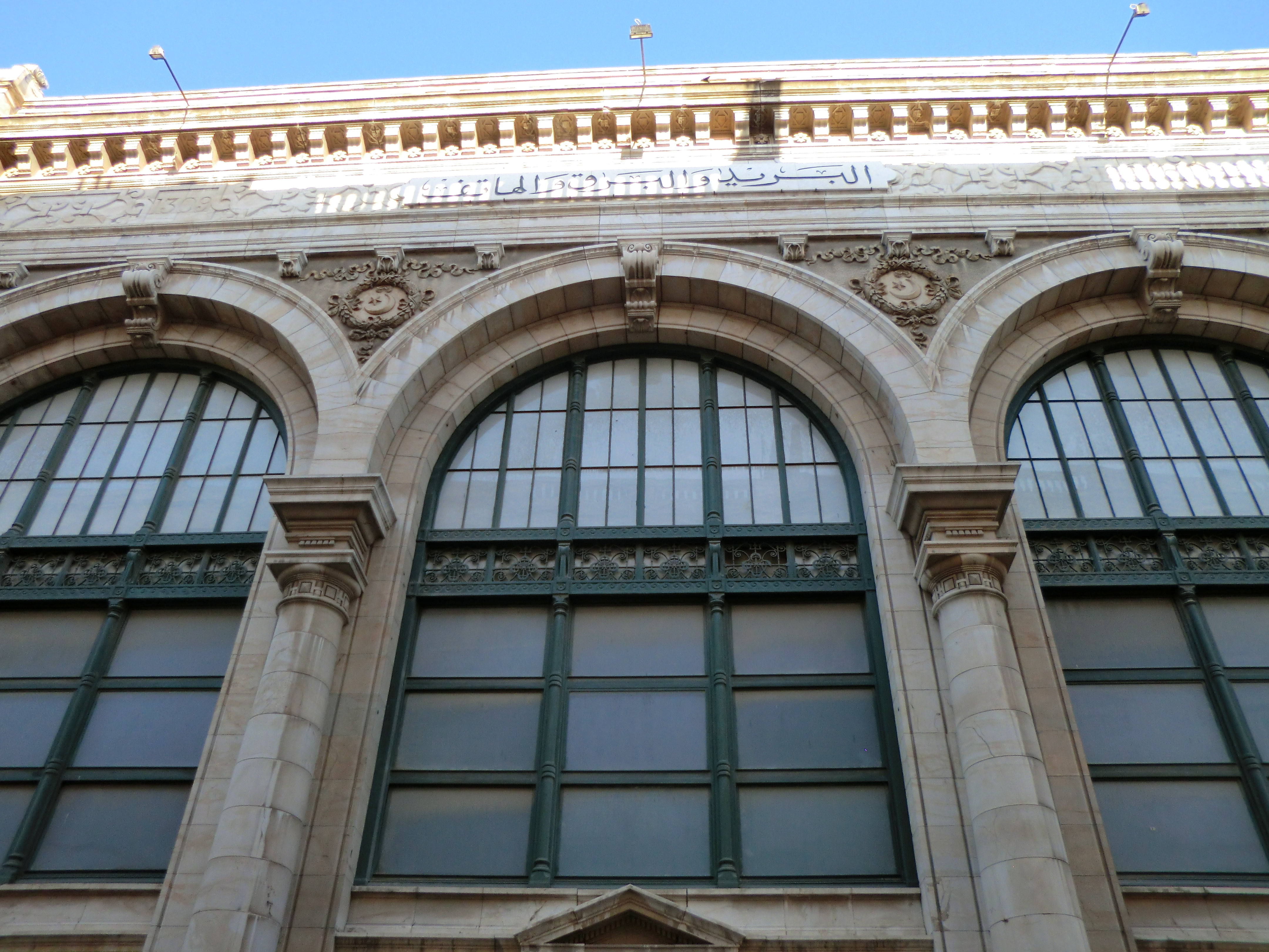 Centre des P.T.T., Tunis